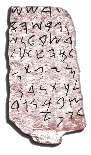 Reproducción de la piedra de Nora con alfabeto fenicio